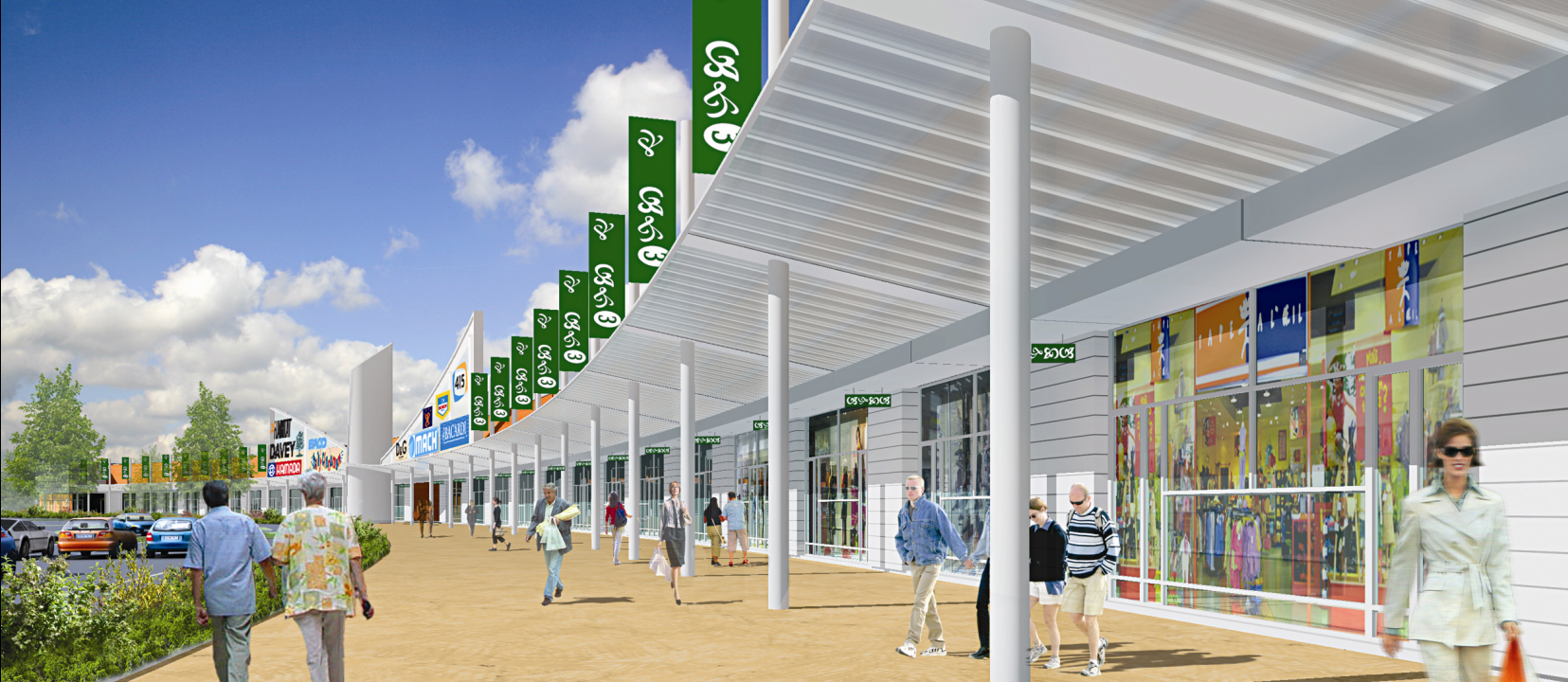 mont st martin pac3